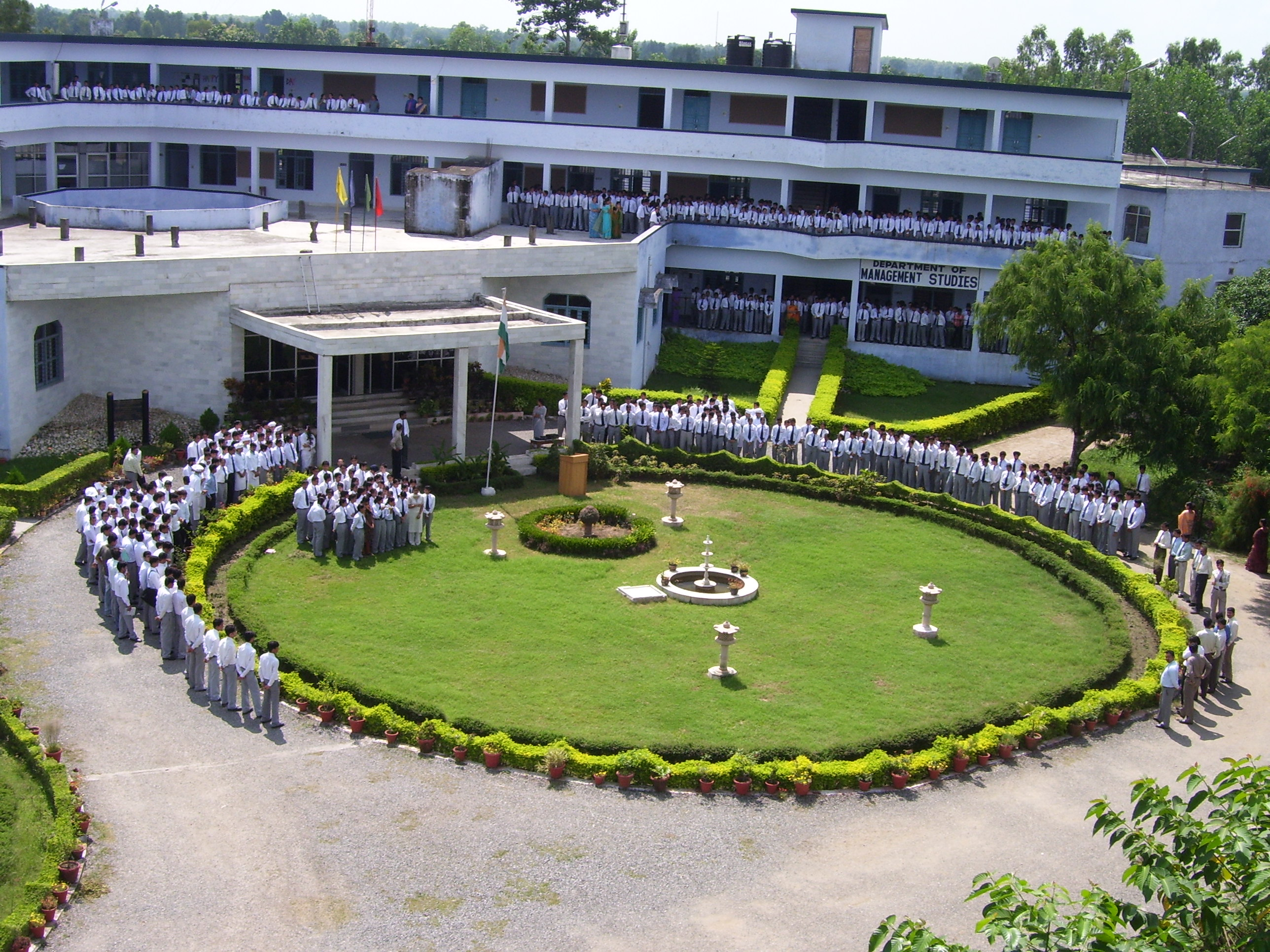 Amrapali